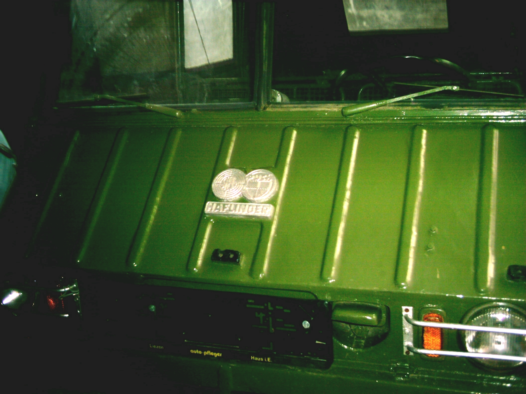 Categorie:Afbeelding auto Cameragegevens: Sluitertijd: 1/9 sec Lensopening: f/3.0 Zoom (Brandpuntsafstand): 54mm (equiv.)* Systematisch afwijking belichting: +0.0 EV Oorspronkelijke grootte afbeelding: 2112 x 1584 Pixels Flits gebruikt: Ja Datum waarop foto is gemaakt: 09/30/2004 (do) Tijd waarop foto is gemaakt: 16:29 Merk camera: Trust. Model camera: Gemini11